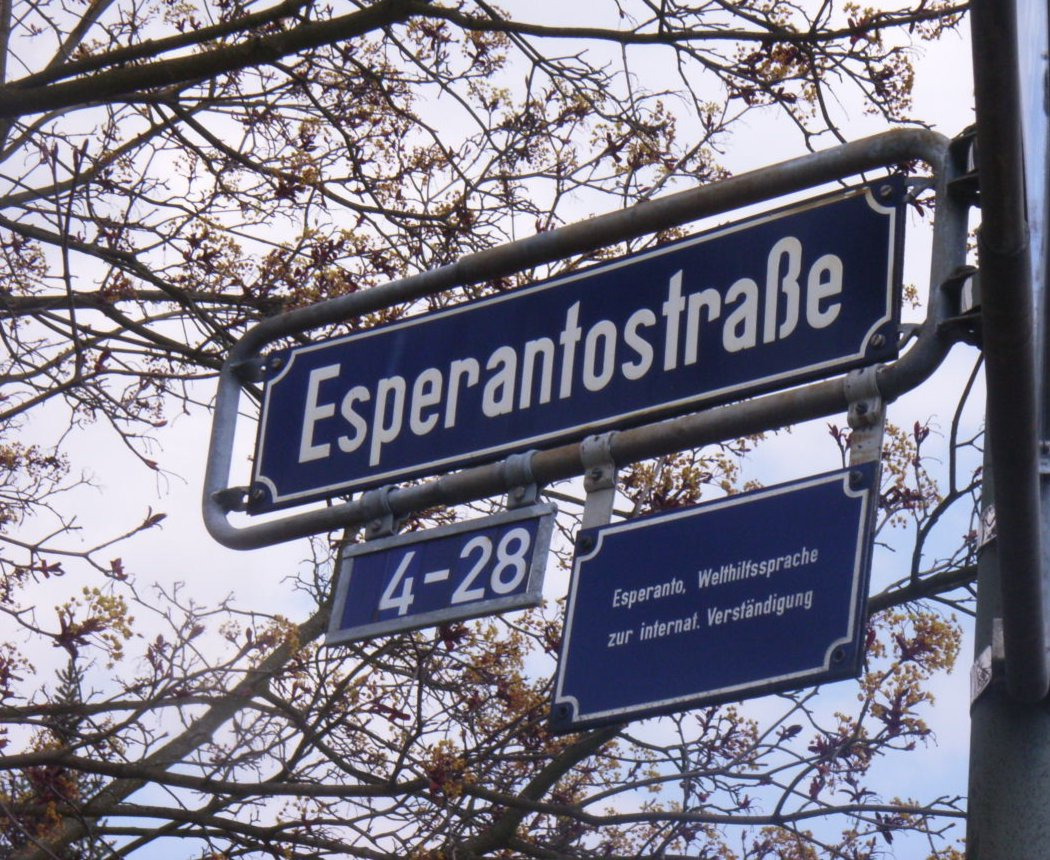 Esperantostraße in Frankfurt am Main (Esperantostraße)